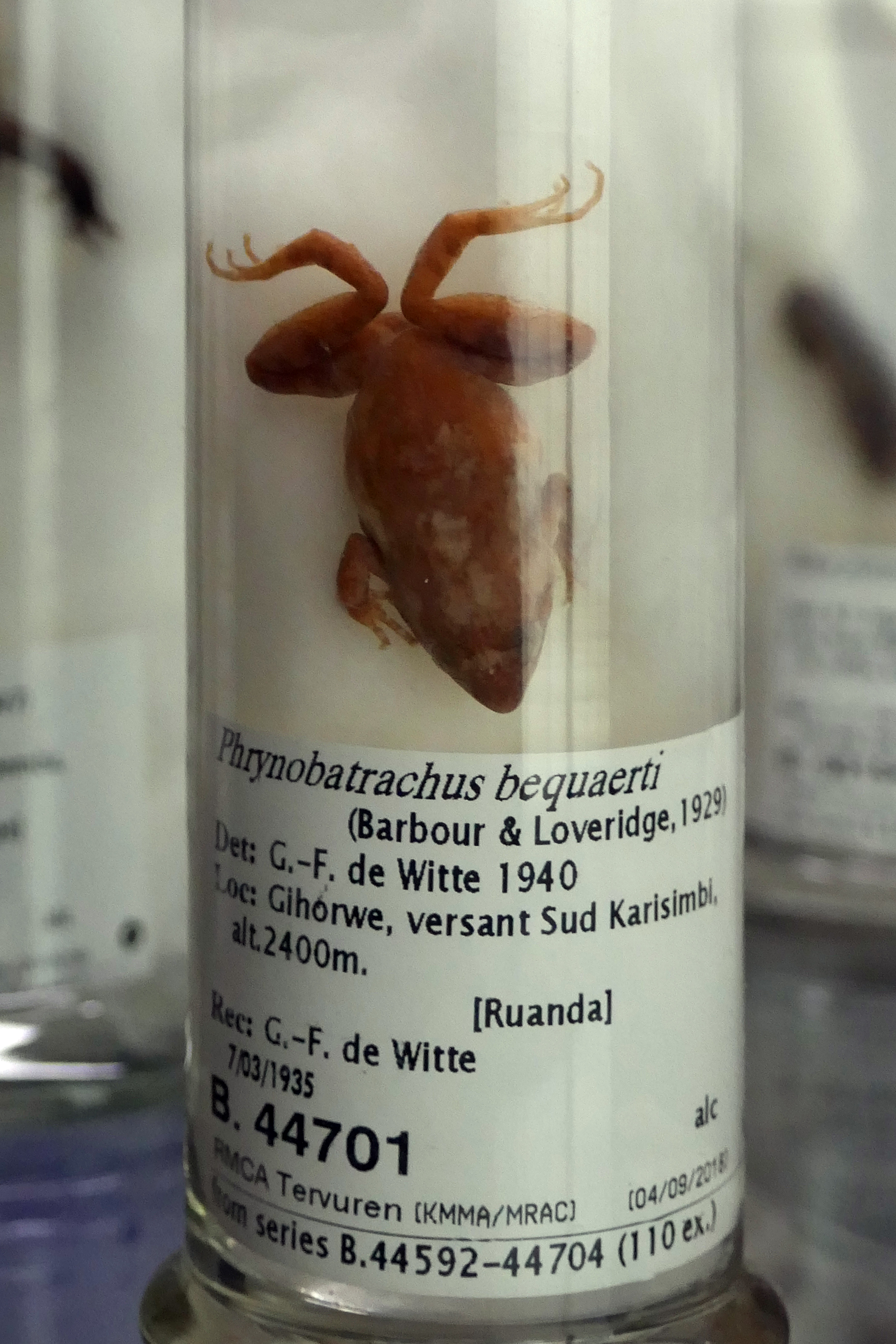 Spécimen de Phrynobatrachus bequaerti (Barbour & Loveridge, 1929), collecté par G. F. de Witte en 1940, à Gihorwe, sur le versant sud du Karisimbi, à une altitude de 2 400 m (Ruanda). Musée royal d'Afrique centrale (Belgique)